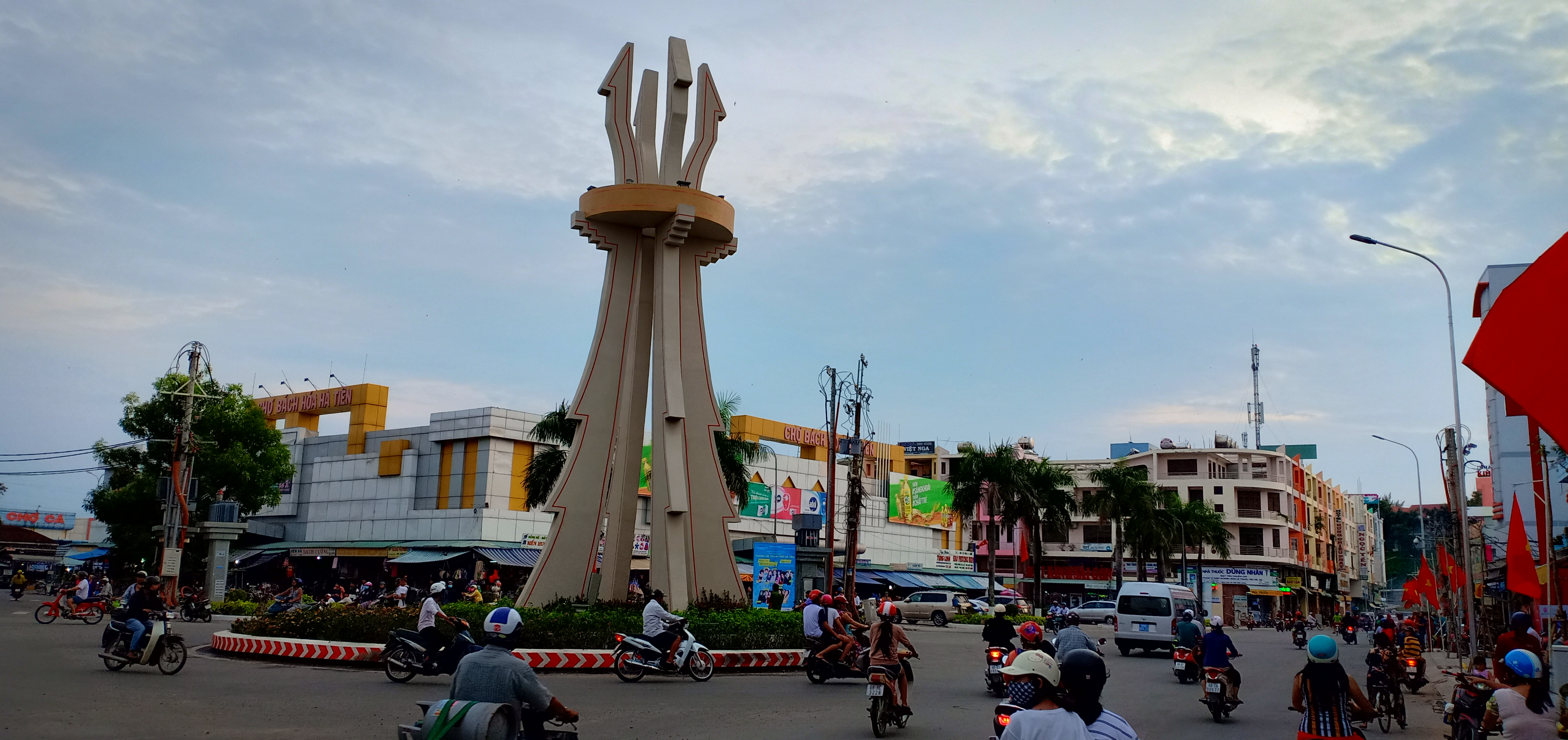 Một gốc TRUNG TÂM THƯƠNG MẠI thành phố HÀ TIÊN - Nơi đây có chợ bách hóa, chợ cá, chợ trái cây, chợ hoa.